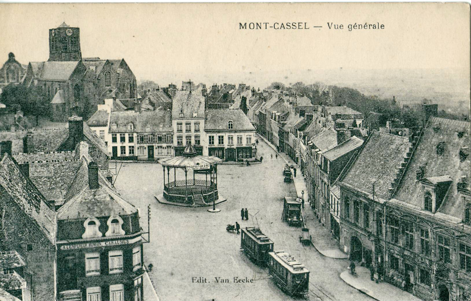 Carte postale ancienne éditée par Van Eecke : MONT CASSEL - Vue générale Vue au premier plan du tramway de Cassel